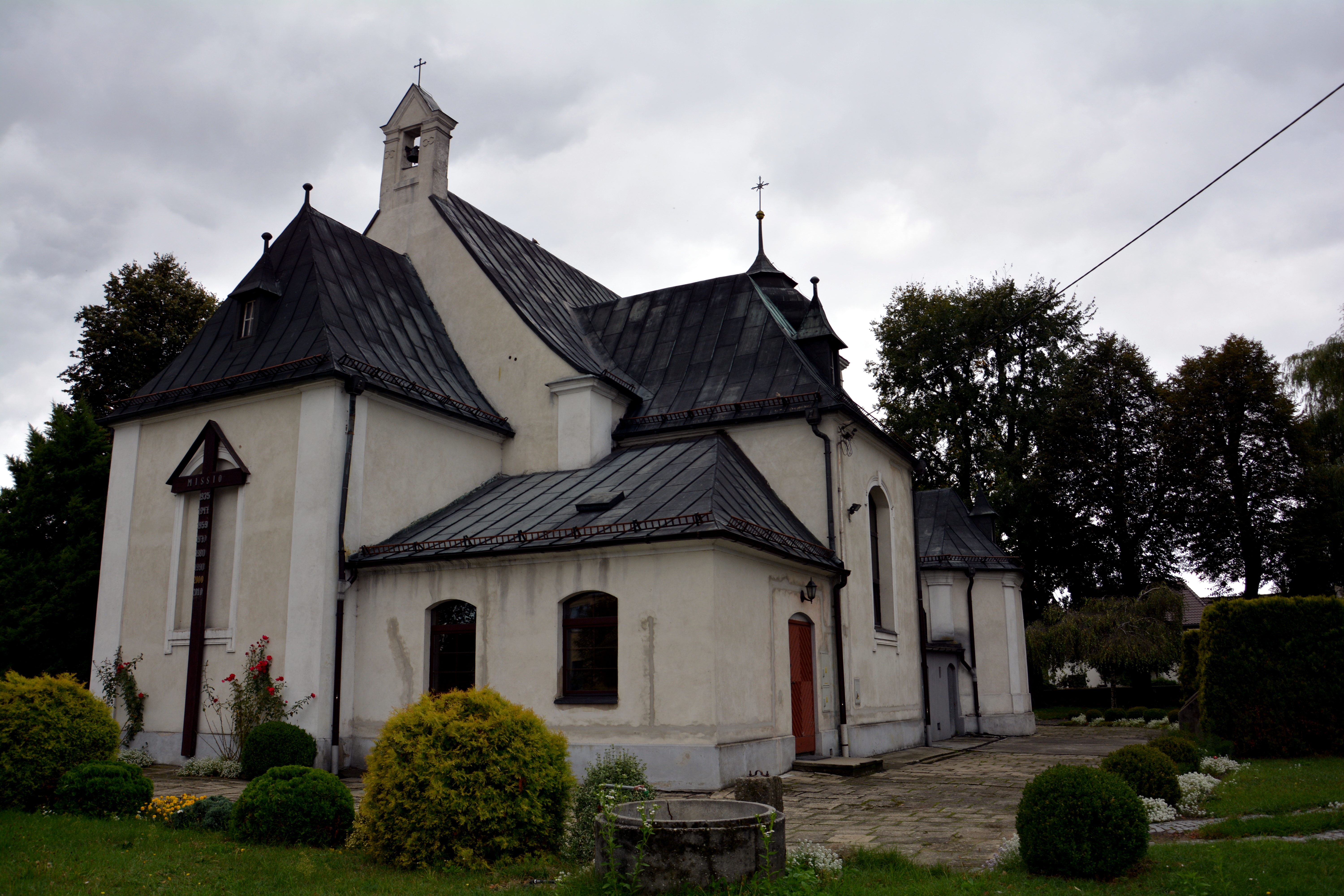 kościół par. p.w. św. Michała, XIV, XVIII, pocz. XX, Rozmierz